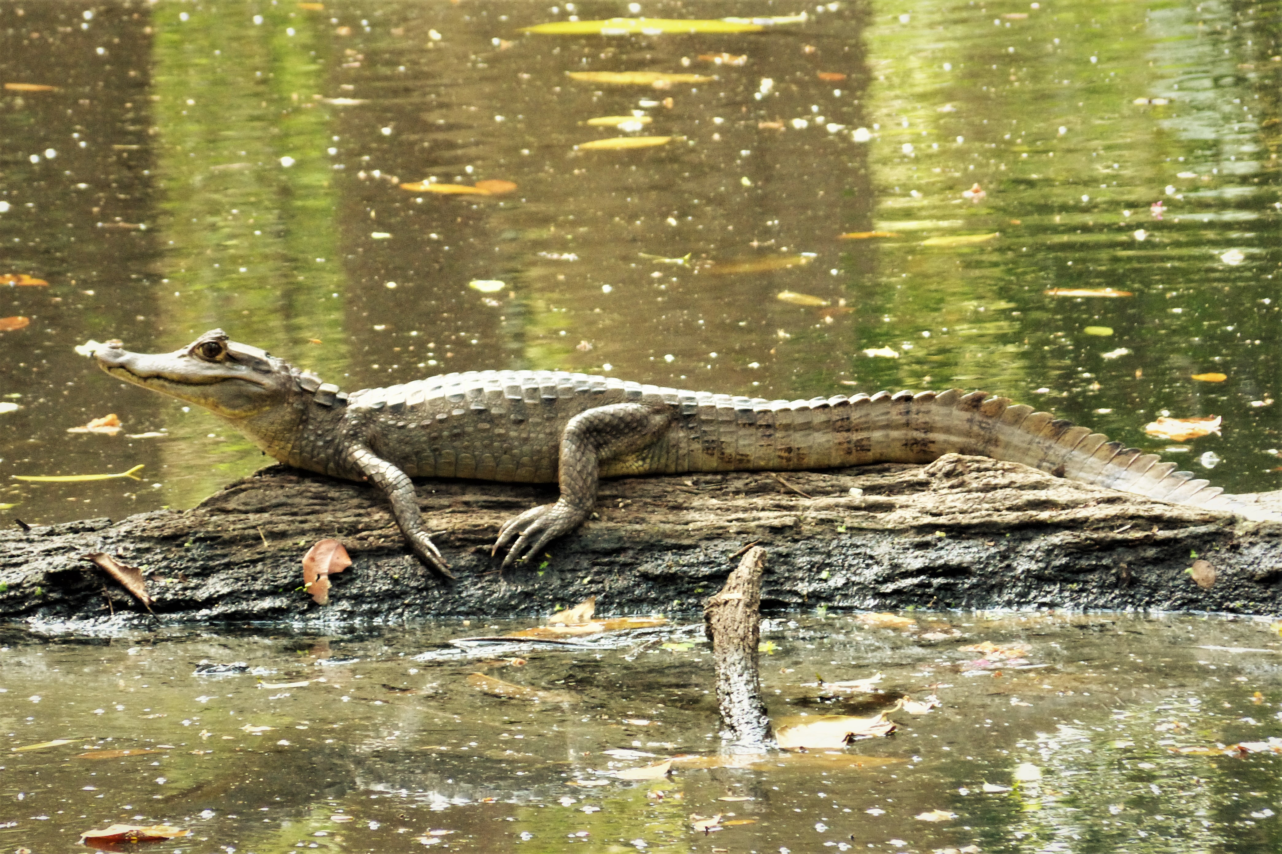 Vigia Garden, nr Torti, Darien Province, Panama